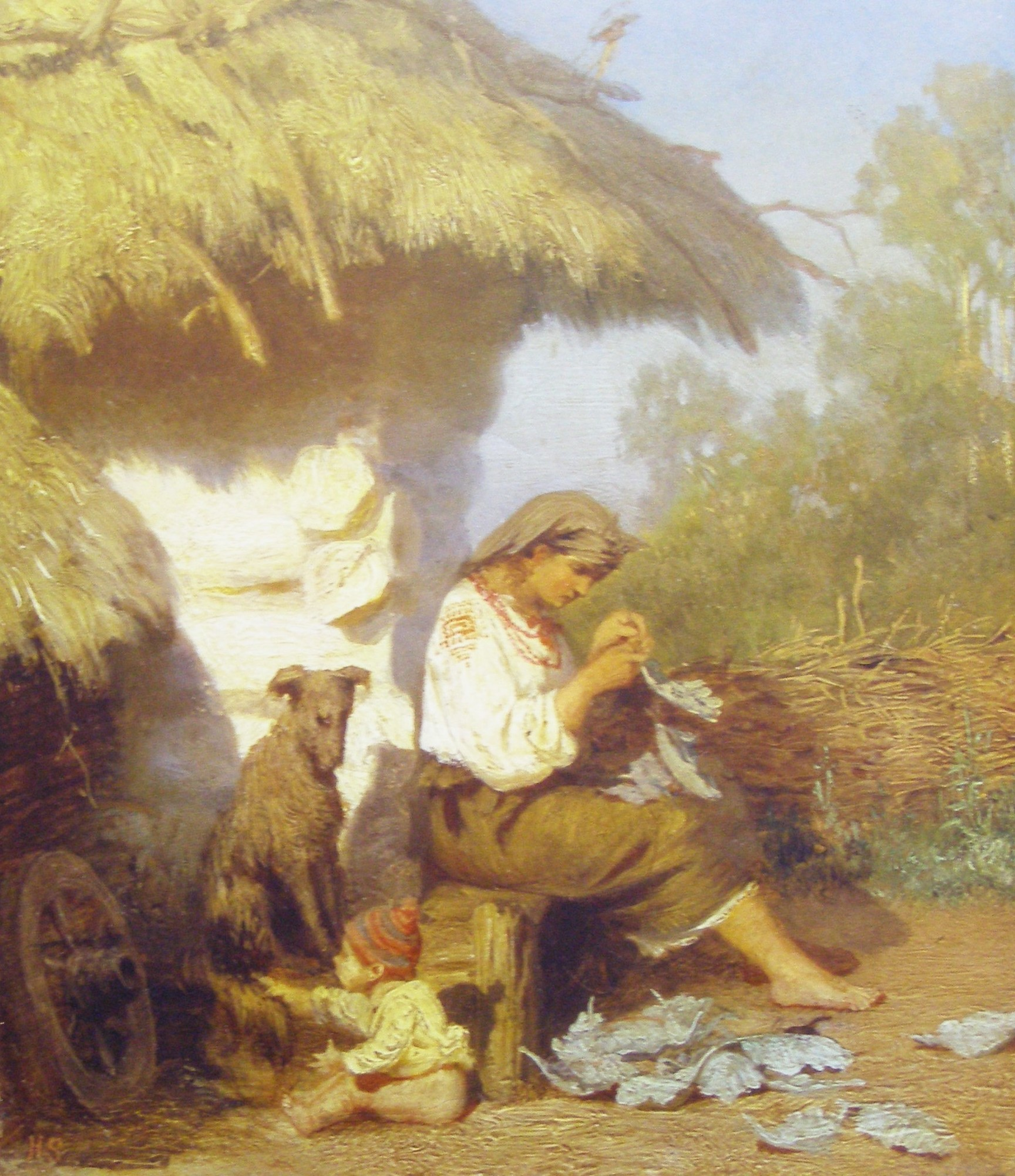 Ученическая работа 1860-х годов